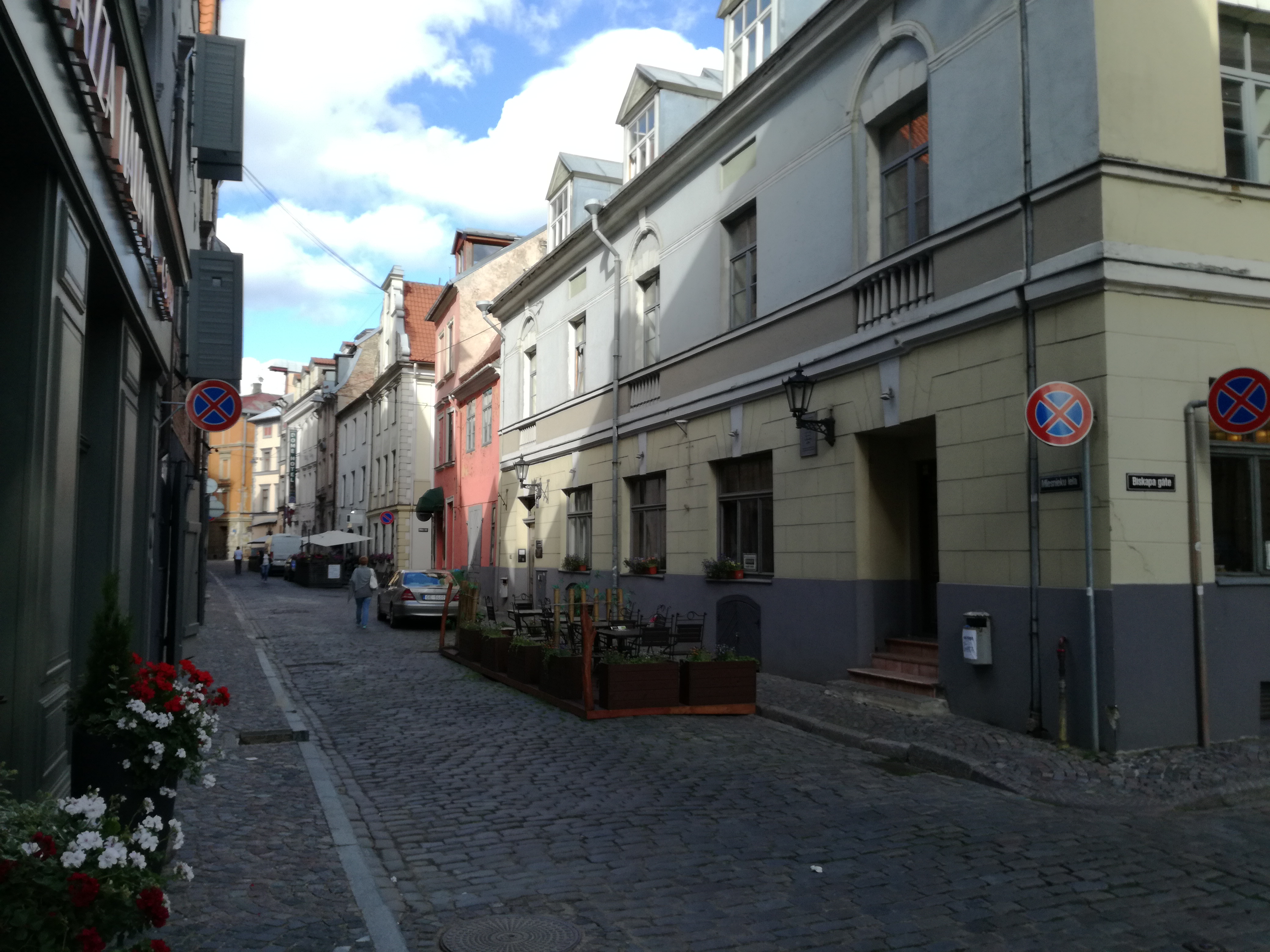 Вецрига